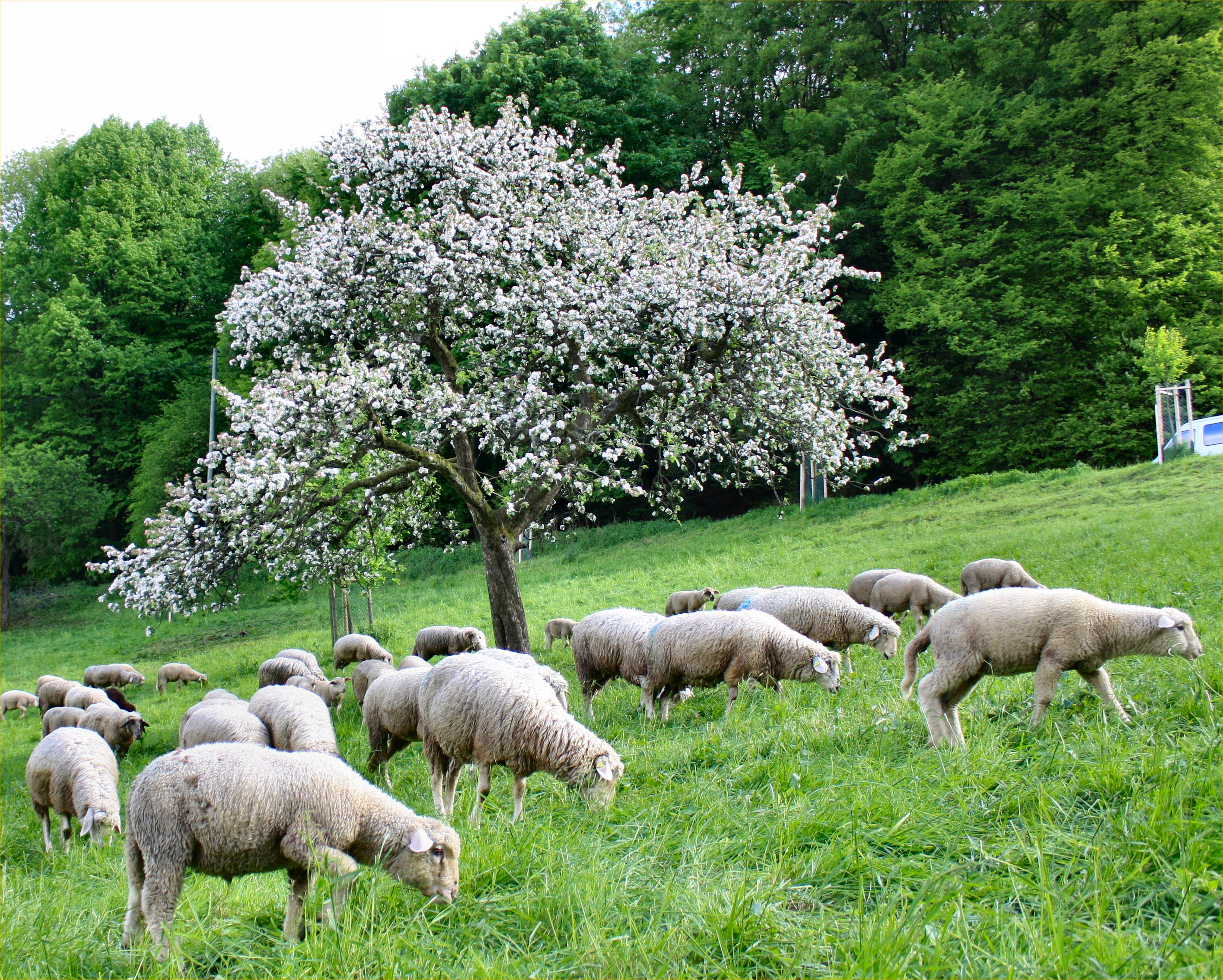 Schafe vor Obstbaum